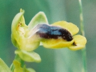 Ophrys lutea: labelle clairement genouillé. Photo prise à Galargues (34), mi-mai 2004.